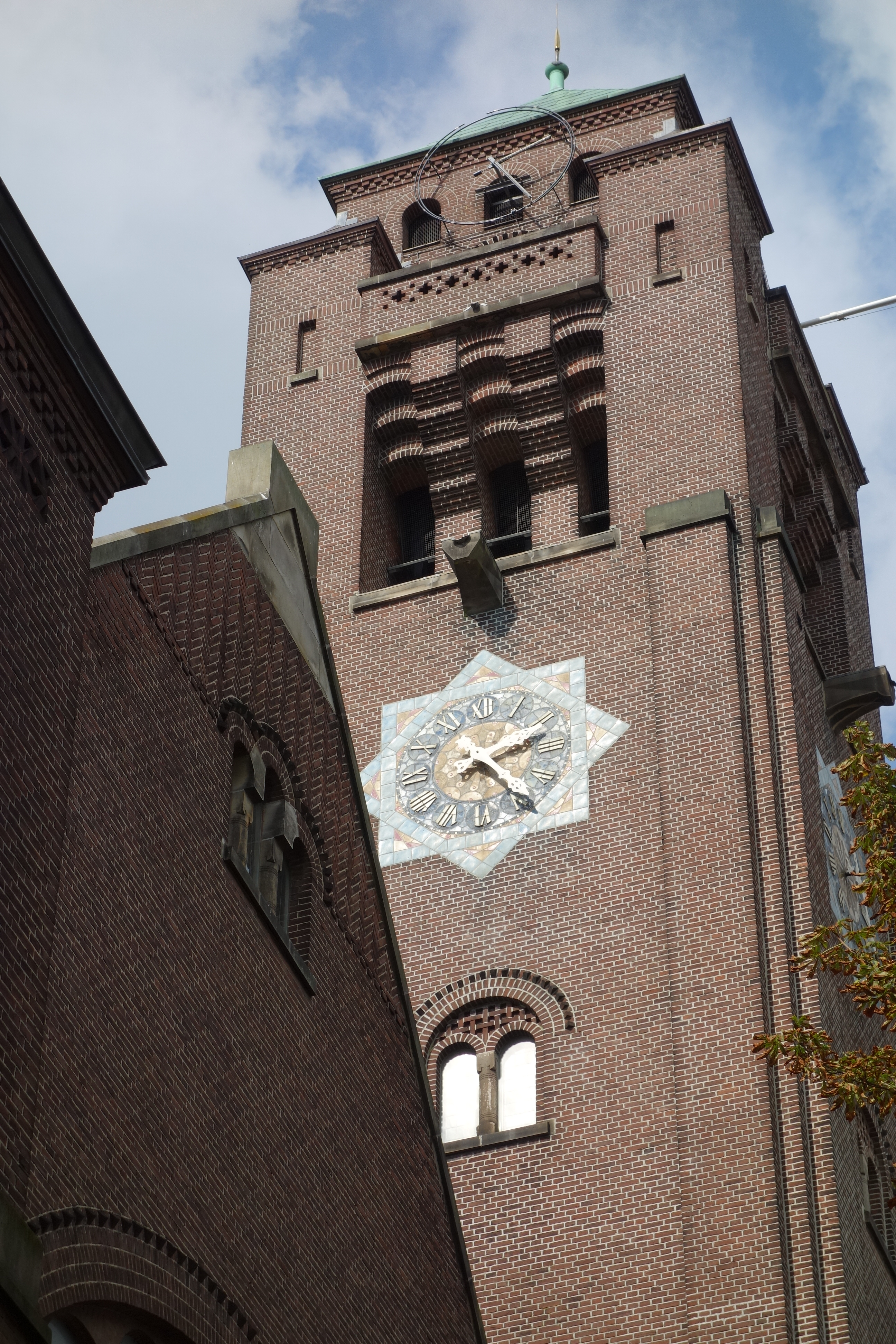 Toren van de Adventskerk aan de Julianastraat 69 in Alphen aan den Rijn.